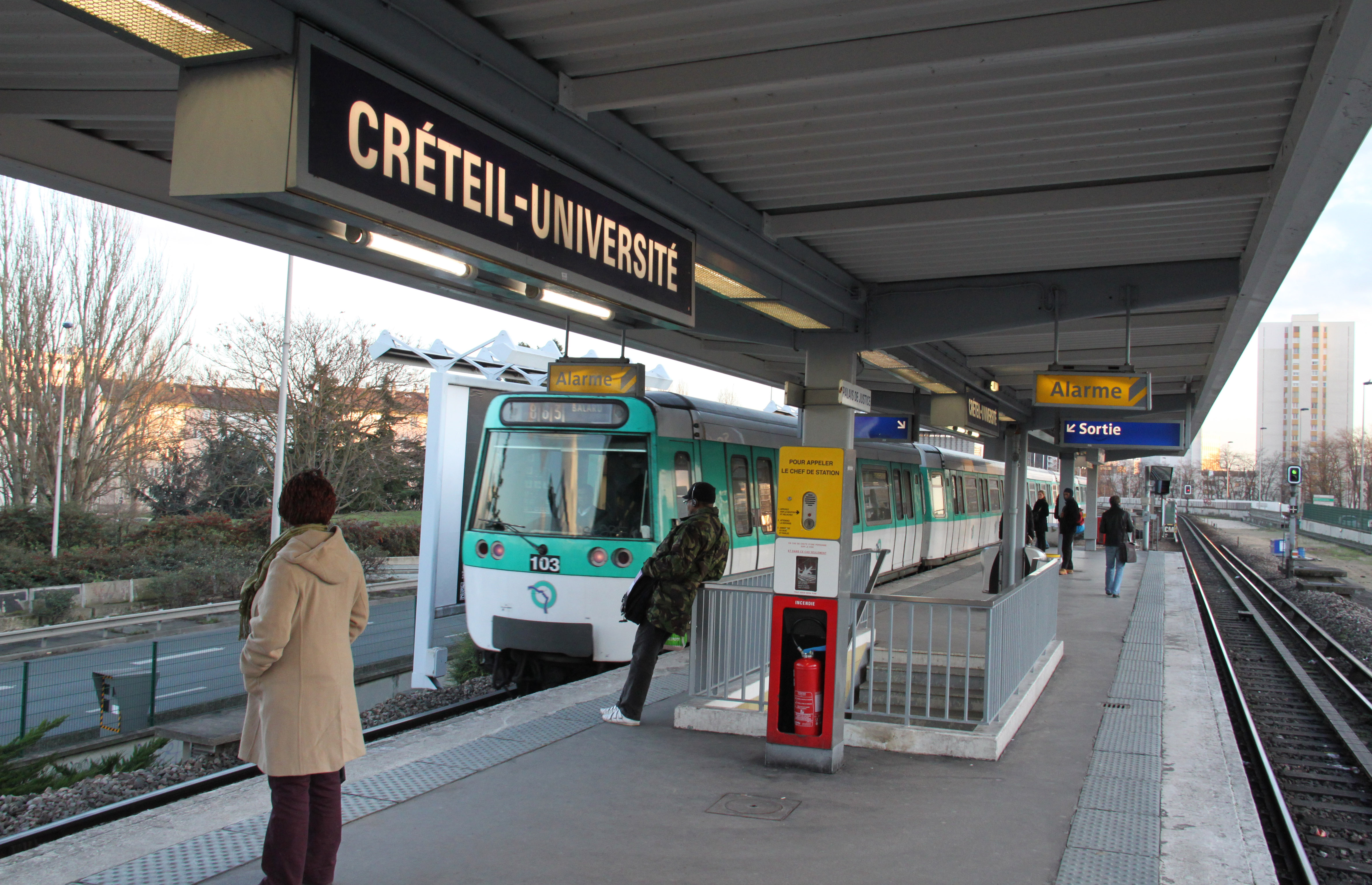 Metrostation Creteil - Université with a train approaching.